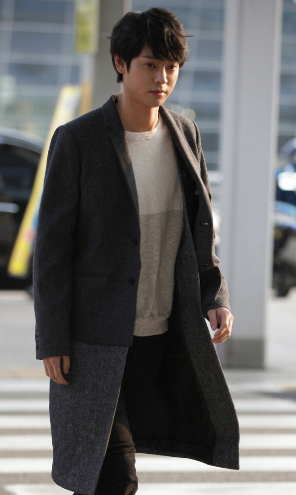 2015 한류패션페스티벌 (Korean Wave Fashion Festival) 포토존 기념행사